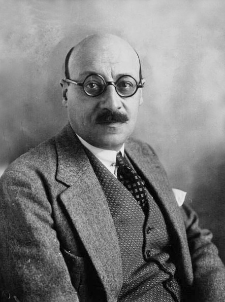 Frossard, député (Martinique) : photographie de presse